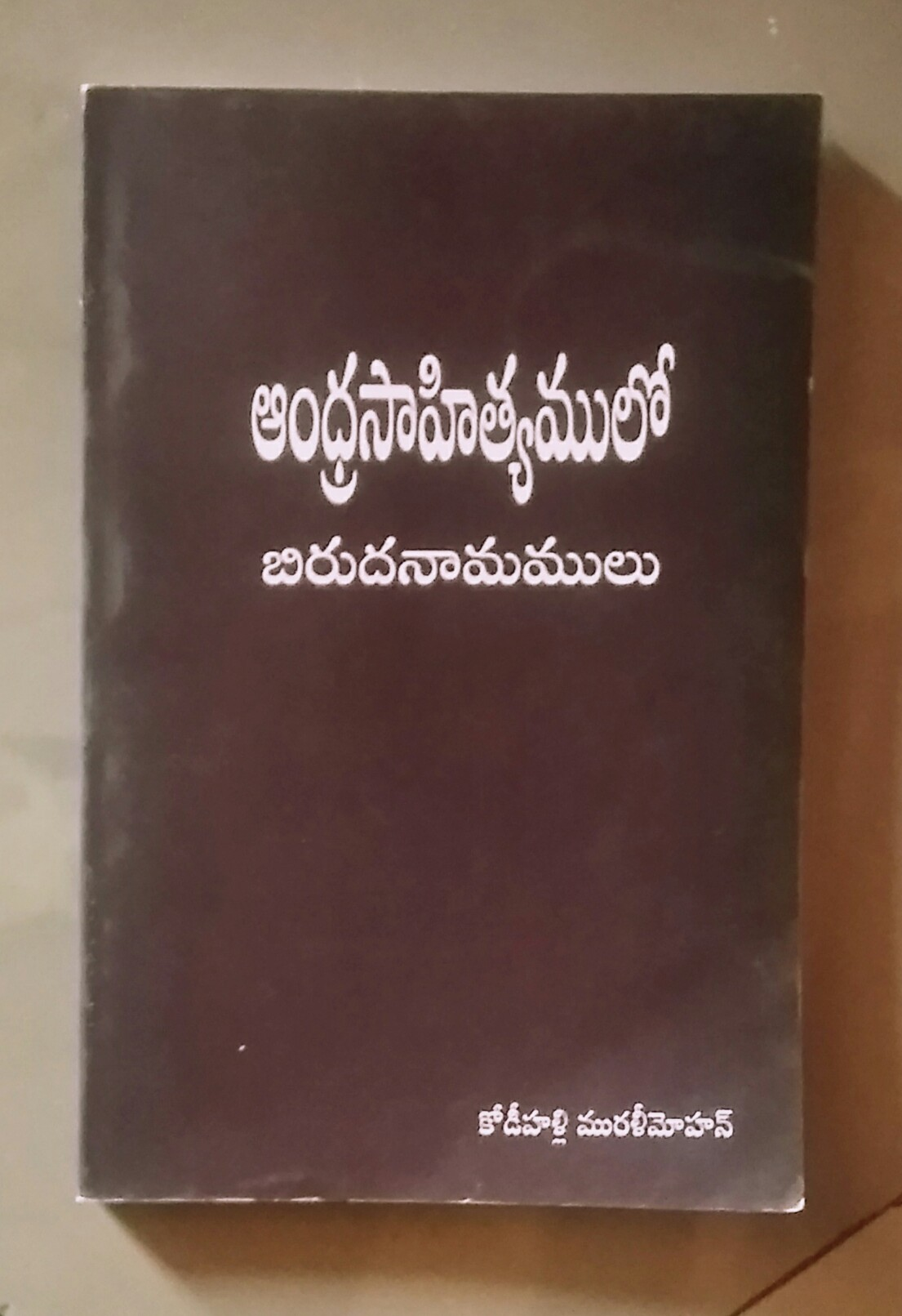 కవులు వారి బిరుదునామాలు